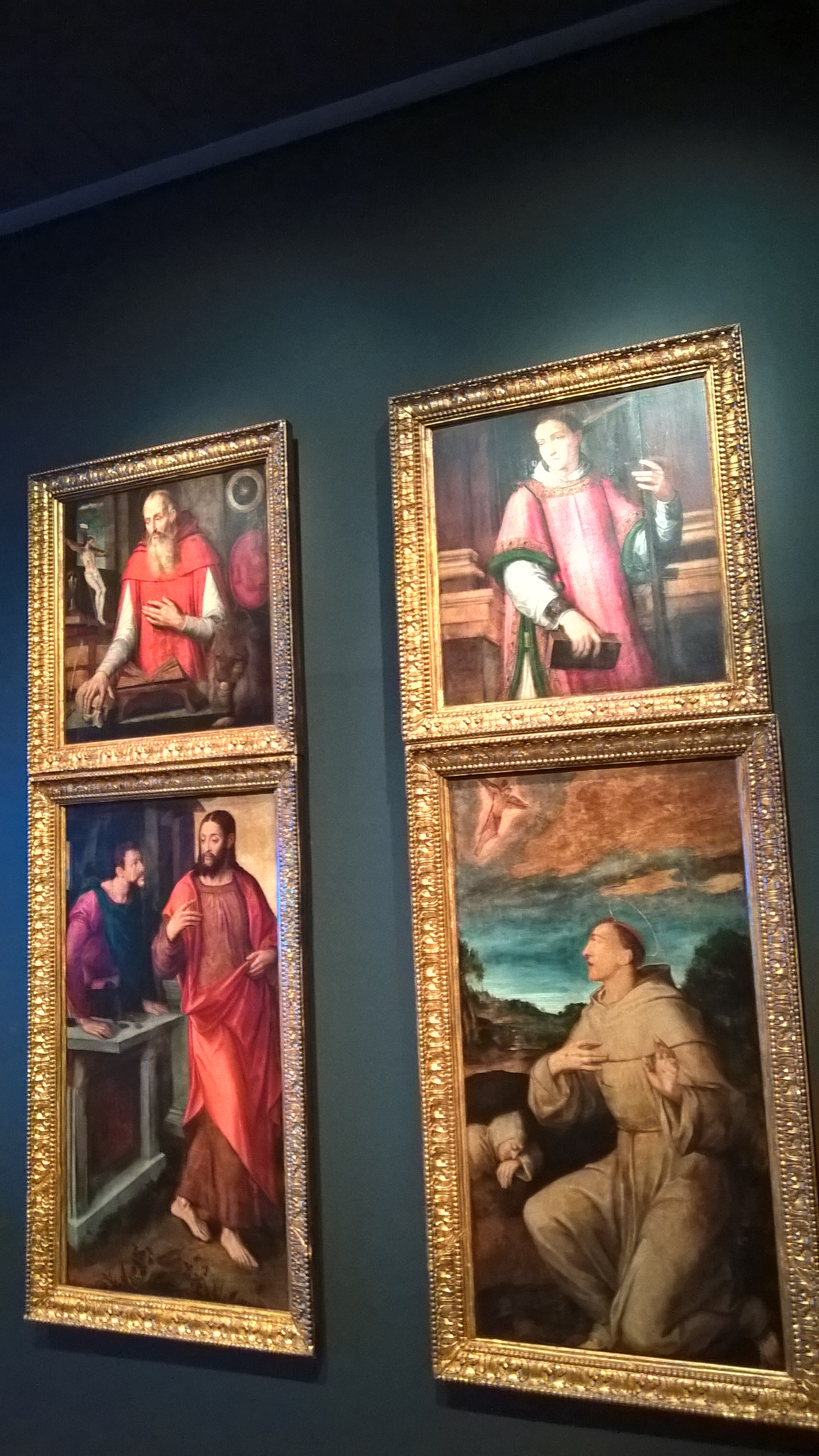 O Políptico flamengo do Altar de S. António são as quatro pinturas sobre madeira que ladeiam a estátua de Santo António no altar dedicado a este santo na Sé Catedral da cidade do Funchal e que se julga terem sido obra de Michiel Coxie ou do seu atelier. Estão actualmente em exposição no Museu de Arte Sacra do Funchal. É constituido pelas pinturas: S. Jerónimo (90 x 70 cm), Vocação de S. Mateus (100 x 90 cm), S. Francisco recebendo os estigmas (100 x 90 cm) e São Lourenço (90 x 70 cm) (no sentido contrário ao do relógio e a contar do topo da esquerda)